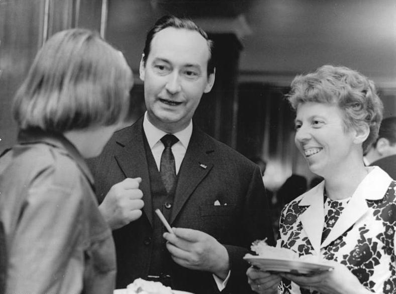 Zentralbild-Franke 8.7.1967 Berlin: Käthe-Kollwitz-Ehrung der DDR 1967 im Apollo-Saal der Deutschen Staatsoper. Die Käthe-Kollwitz-Medaille wurde am 8.6.1967 der Käthe-Kollwitz-Oberschule Mühlenbeck, Bez. Potsdam, verliehen. Die Lehrerin Irene Klotzsche (rechts), der Käthe-Kollwitz-Oberschule Mühlenbeck und die Schülerin Ellinor Klotzsche (links) im Gespräch mit Prof. Werner Klemke, Sekretär der Sektion Bildende Künste der Akademie der Künste zu Berlin.